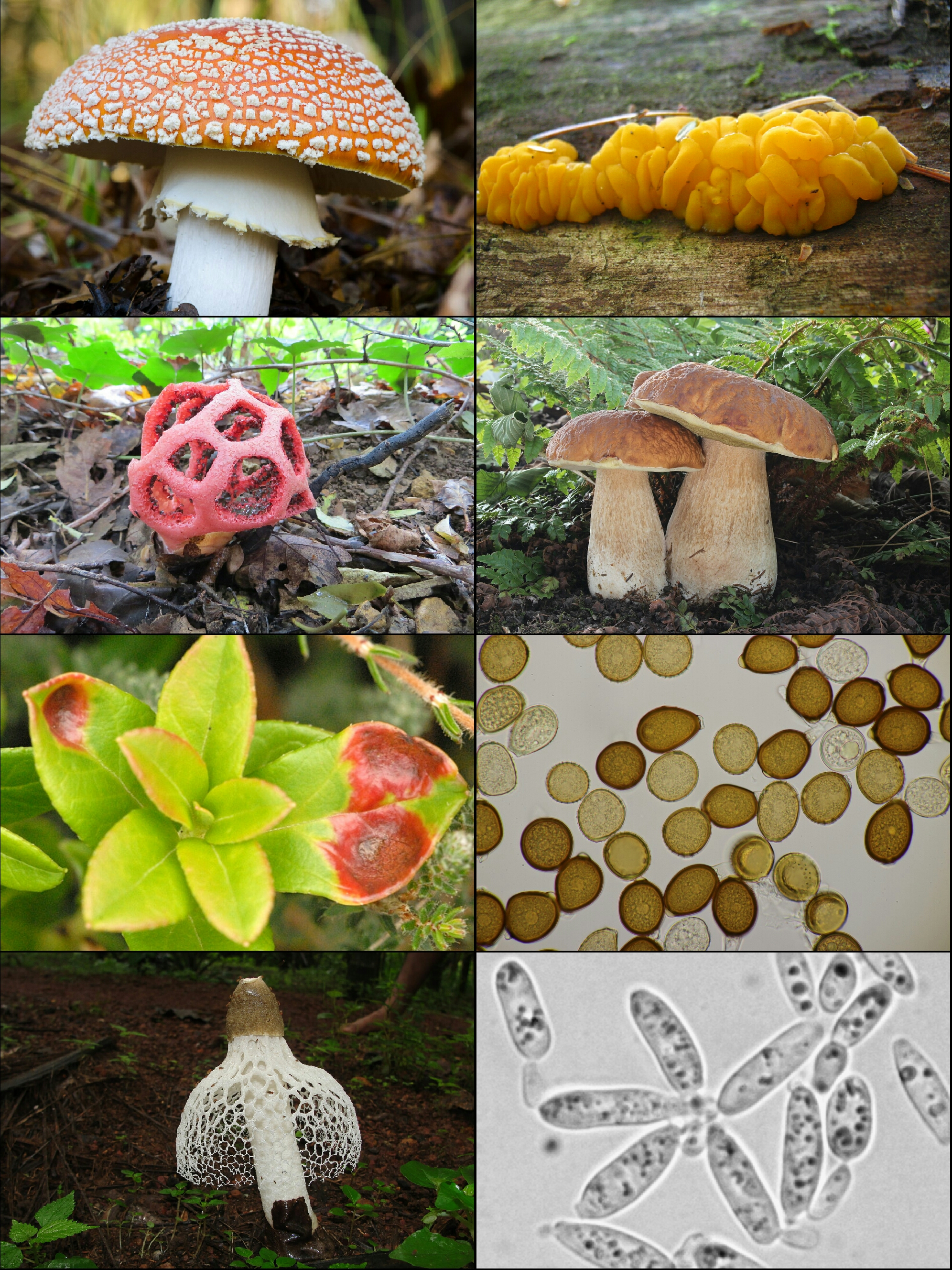 Collage de basidiomicetos basado en imágenes de Commons.